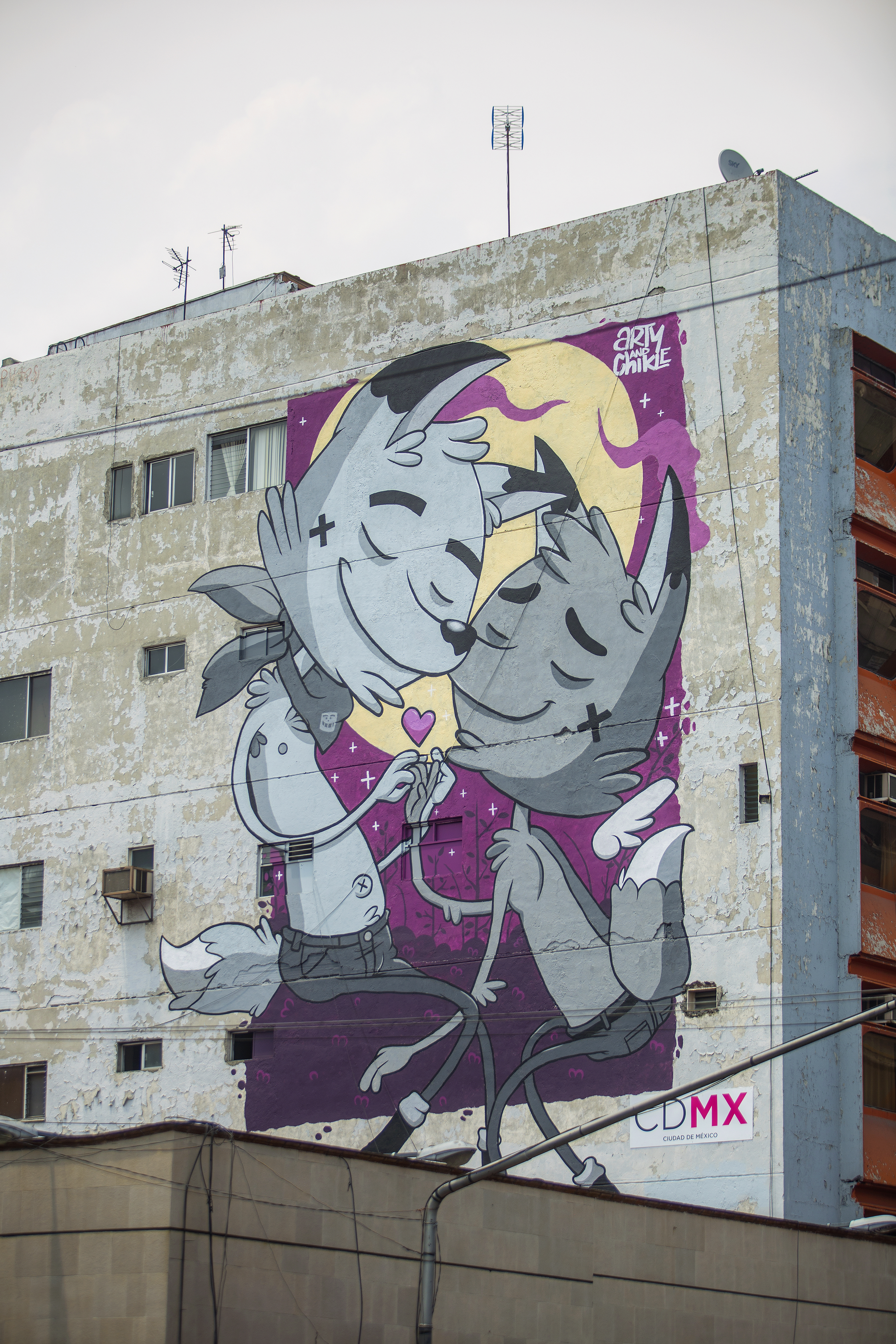 Murales / Arte urbano